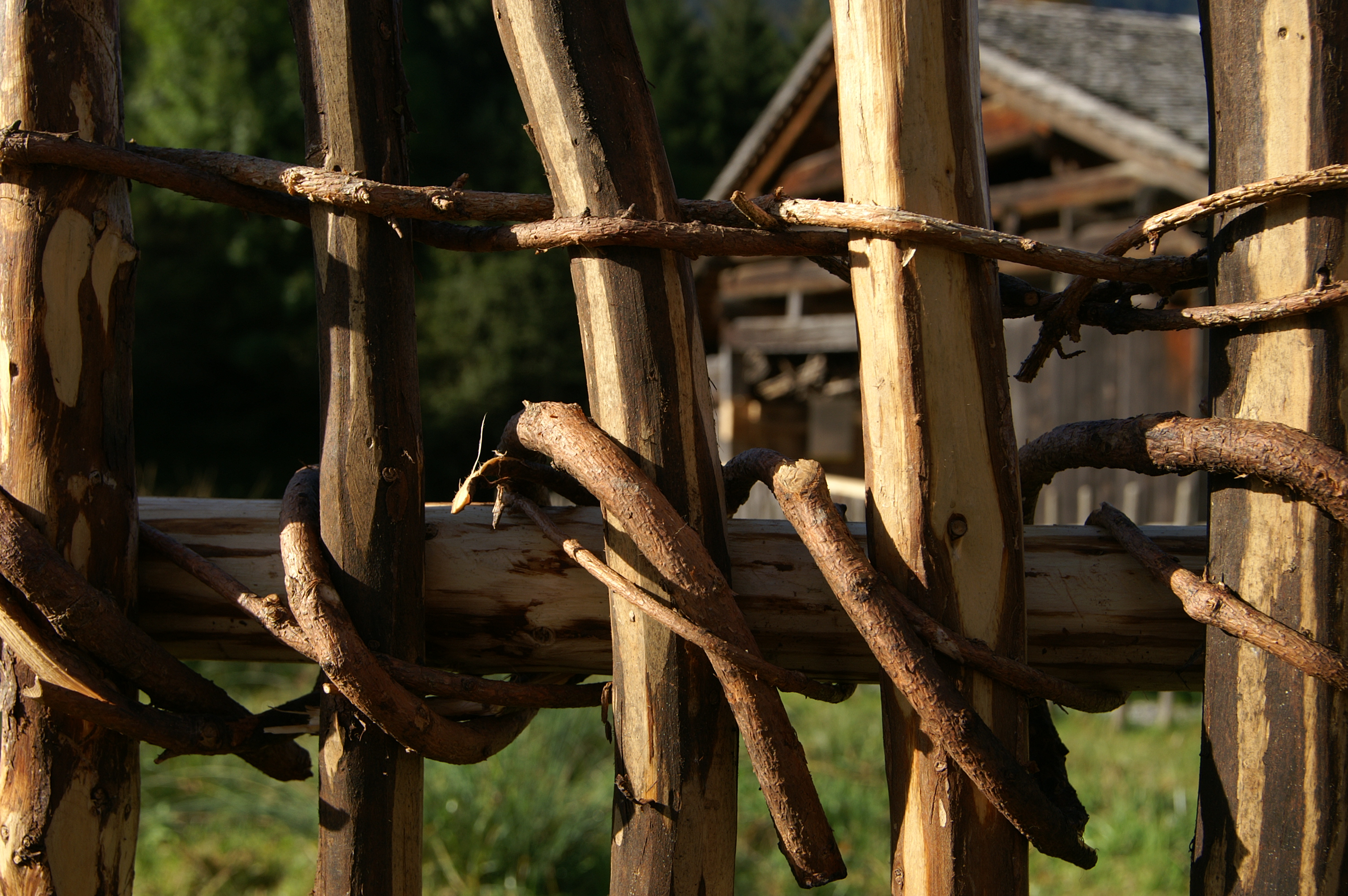 Speltenzaun mit einfacher Flechtung auf dem Holdamoos in Schoppernau